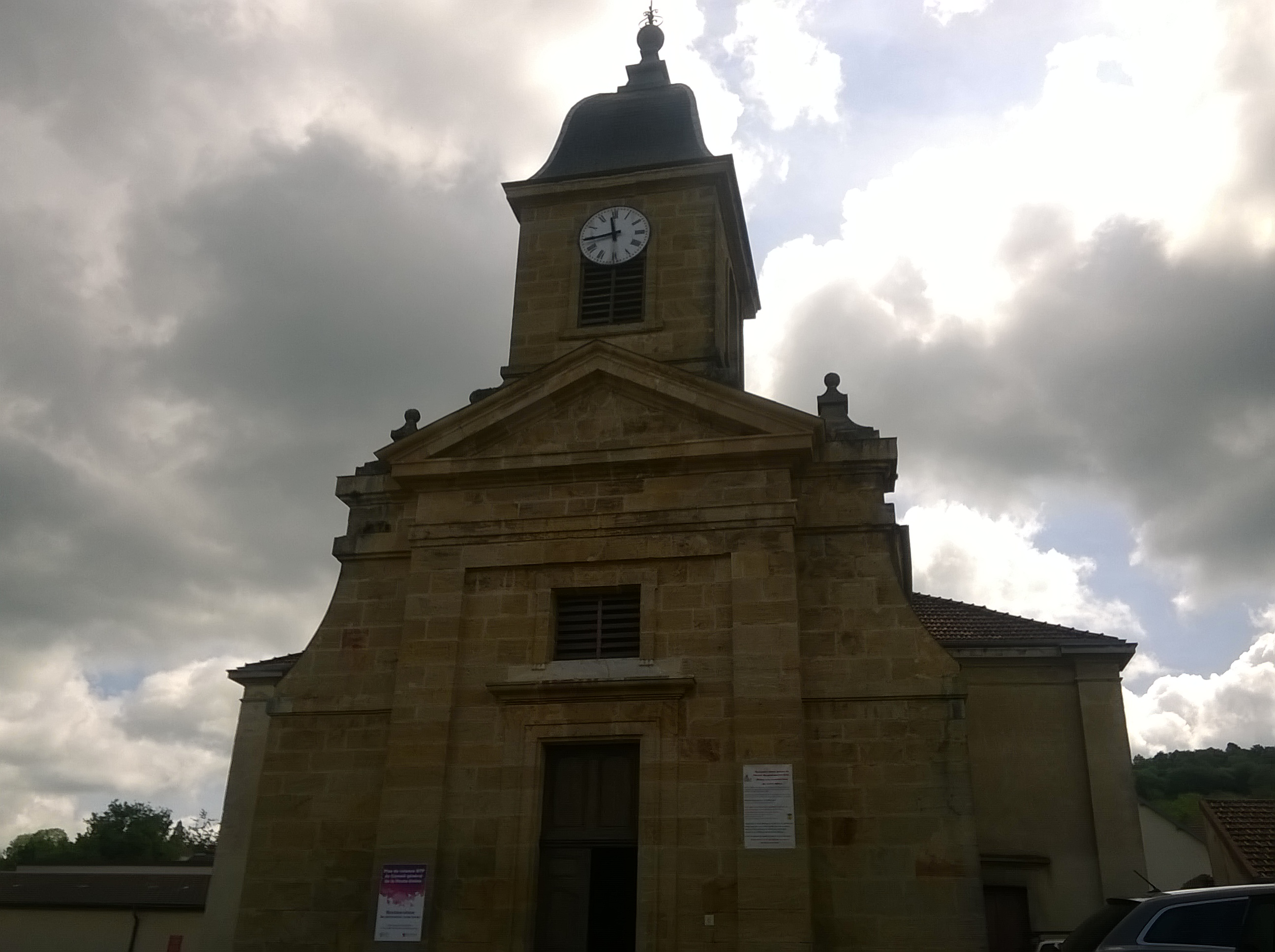 Echenoz Eglise